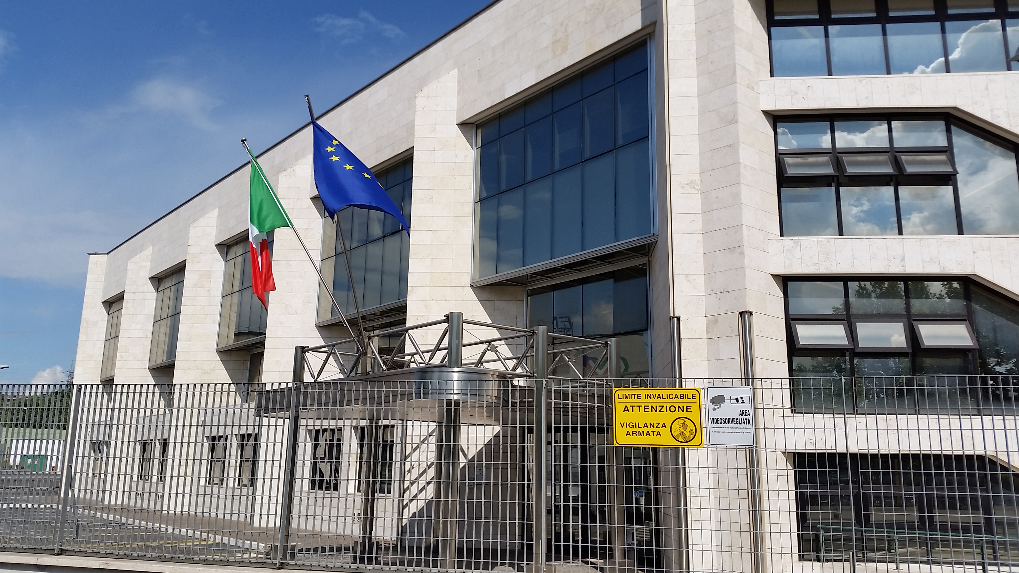 Sede principale IPZS a Roma, via Salaria 1027